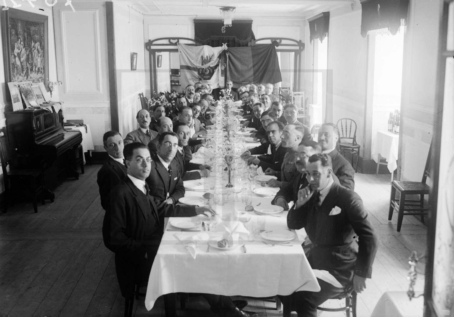 TUNA ACADÉMICA DE LISBOA. ASPECTO DO ALMOÇO COMEMORATIVO DO 31º ANIVERSÁRIO DA SUA FUNDAÇÃO.